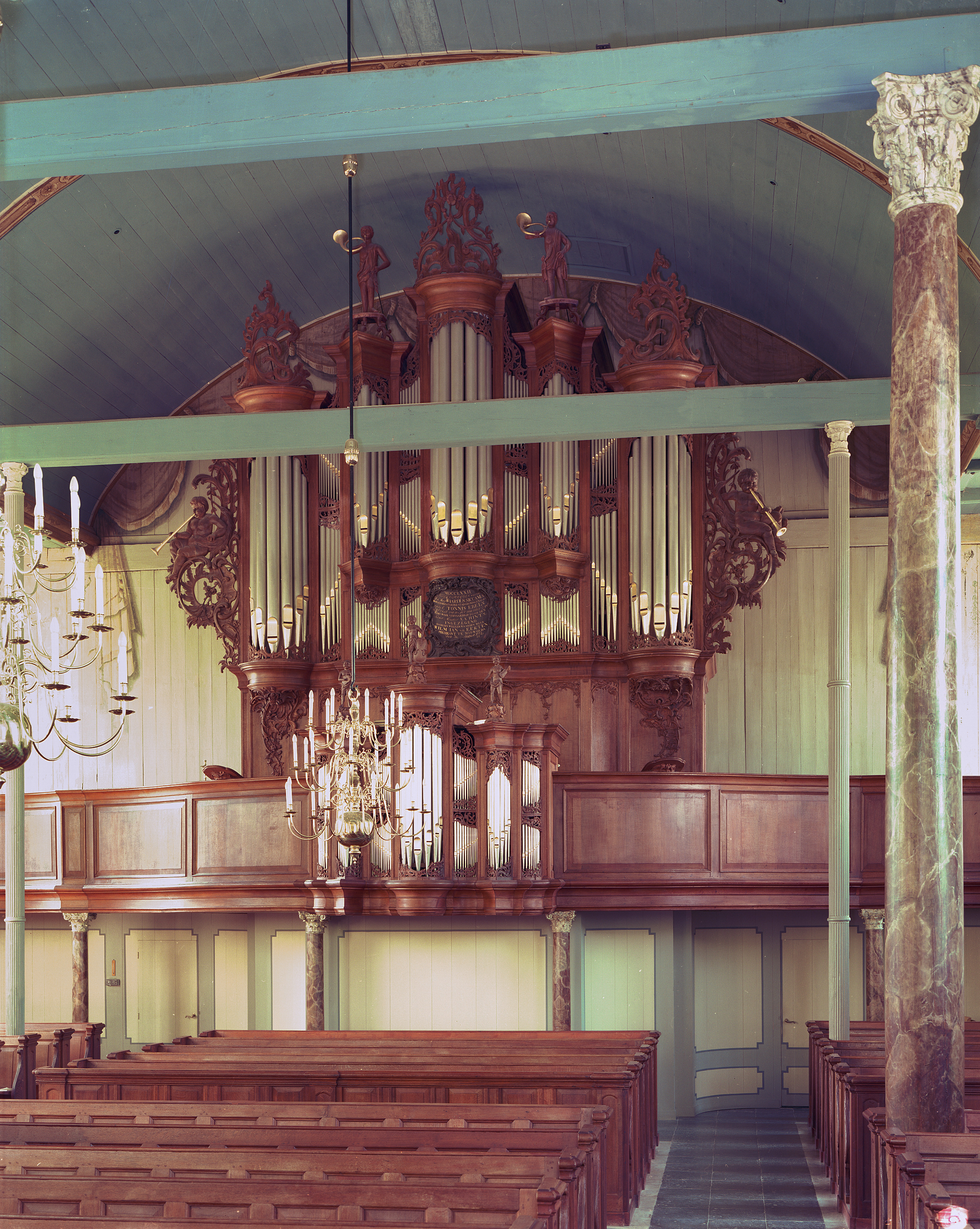 Hervormde kerk en toren: Interieur, overzicht van het orgel, orgelnummer 985 (opmerking: Gefotografeerd voor Het Historische Orgel in Nederland 1769-1790, bladzijder 71)